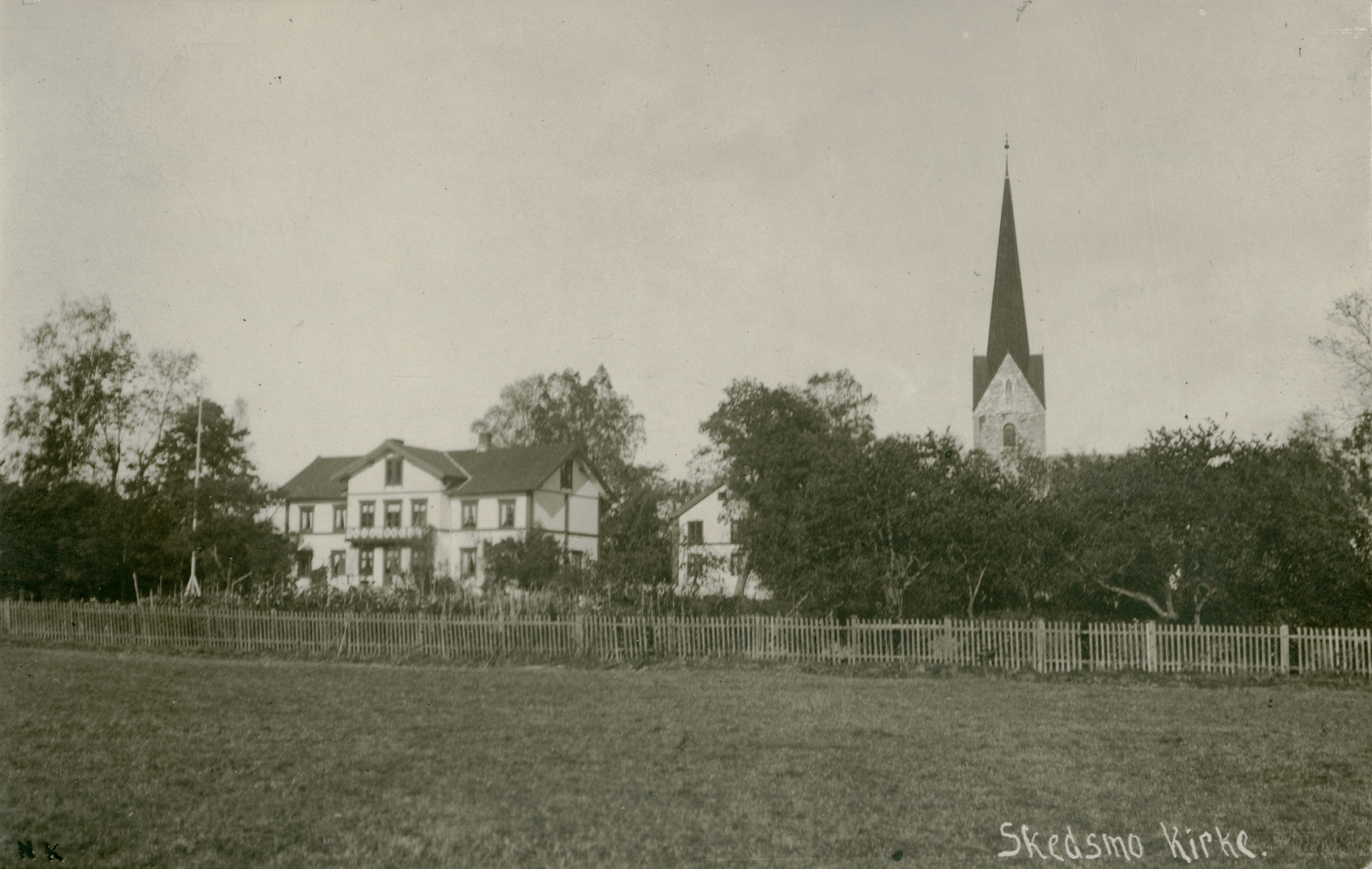 Skedsmo prestegård i Skedsmo, Akershus This image on crowdsourcing geotagging platform Fotodugnad